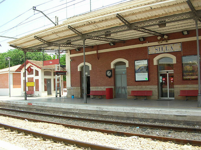 Estación de Silla.